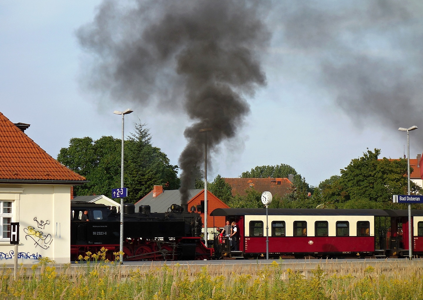 Die historische Kleinbahn Molli macht auf dem Bahnhof Bad Doberan richtig Dampf.